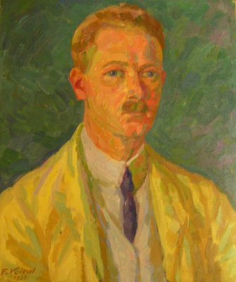 Selbstbildnis